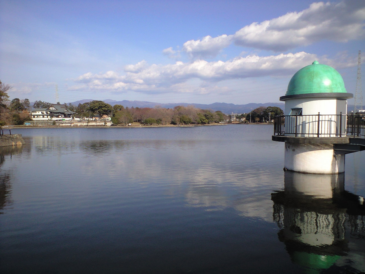 静岡県沼津市岡一色、門池